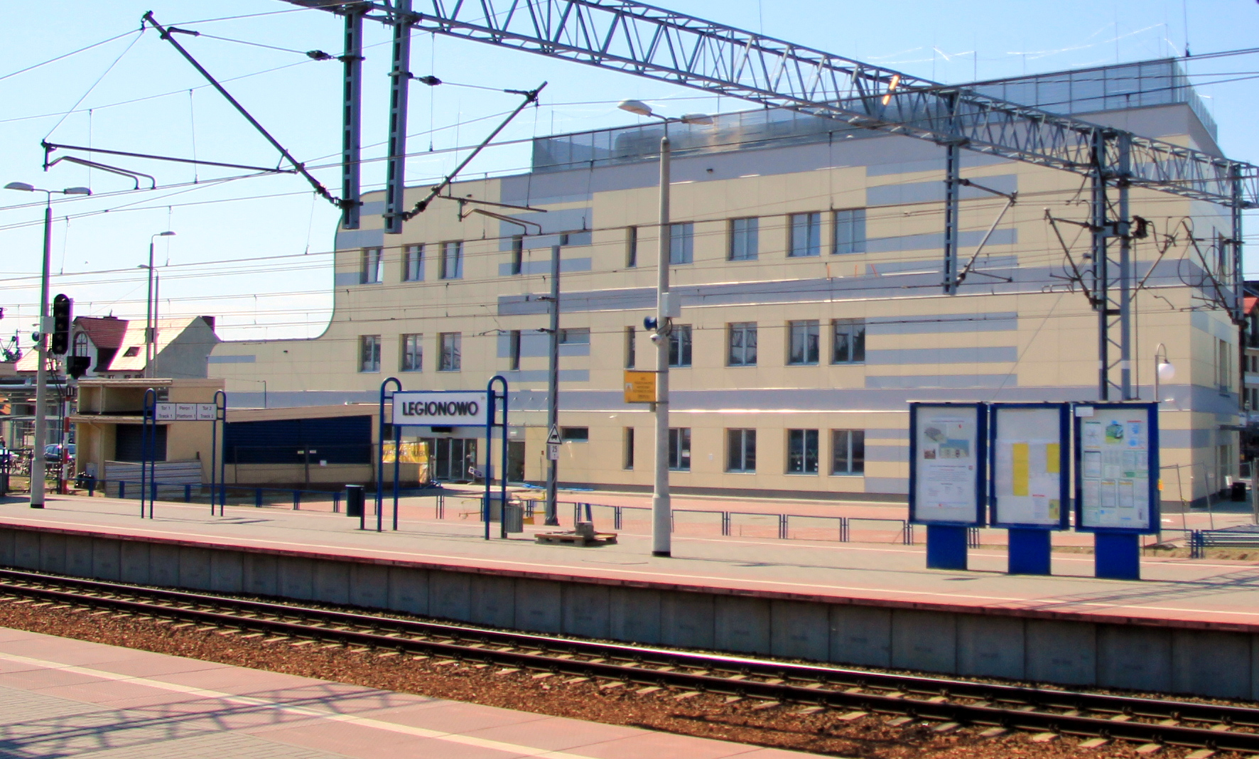 Legionowo - dworzec - woj. mazowieckie